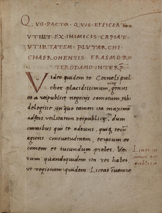 Seite 5r aus dem Autograph:”Quo pacto quis efficiat ut ex inimicis capiat utilitatem / Plutarchi Chaeronensis Erasmo Roterodamo interprete”